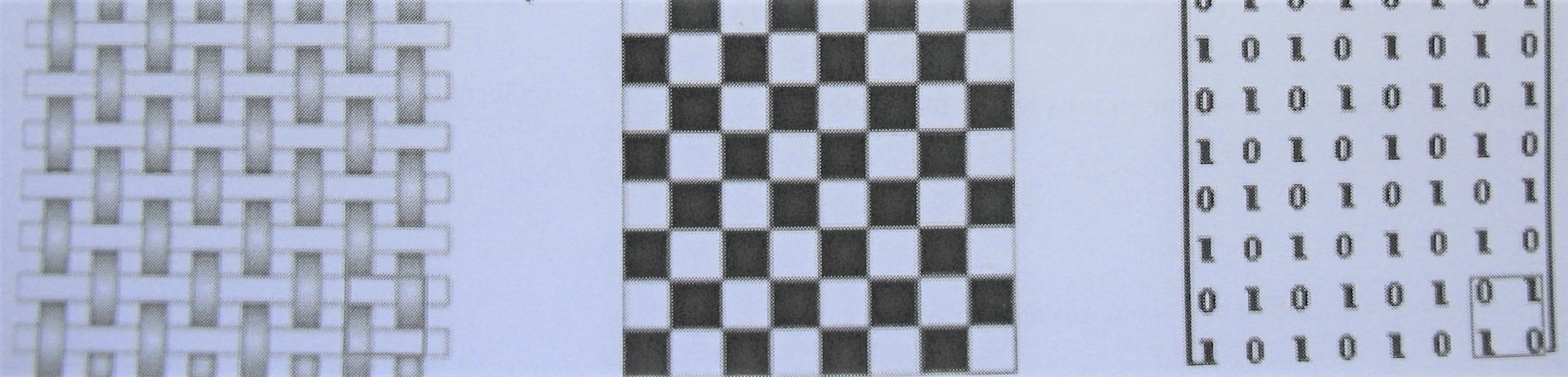 Plátnová vazba tkaniny: kreslená a digitální vzornice